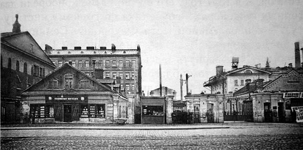 Cantieri navali Semjannikov, San Pietroburgo, 1900